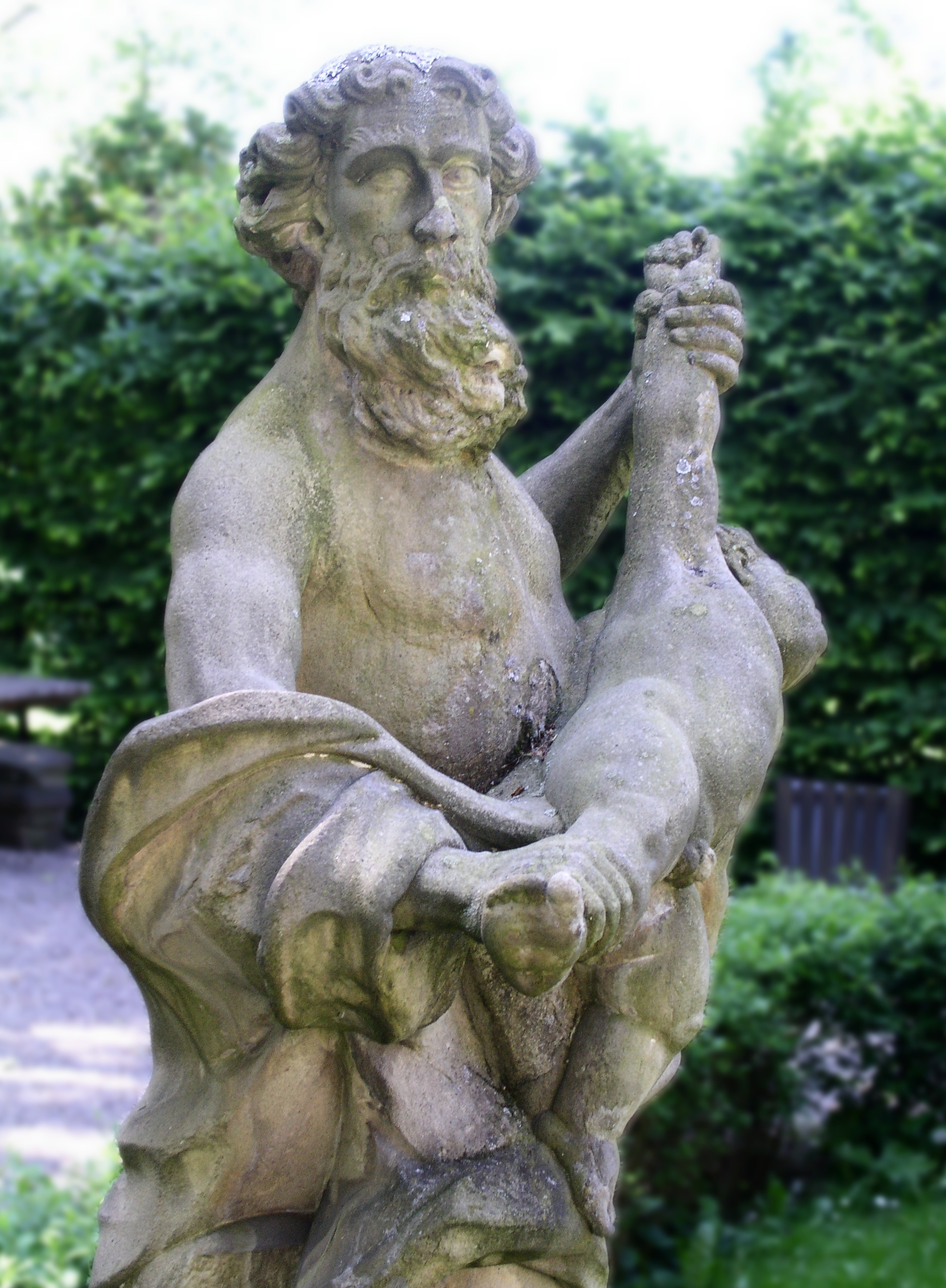 Kronosstatue aus dem Hesperidengarten in der Johannisstr. 13 in Nbg.